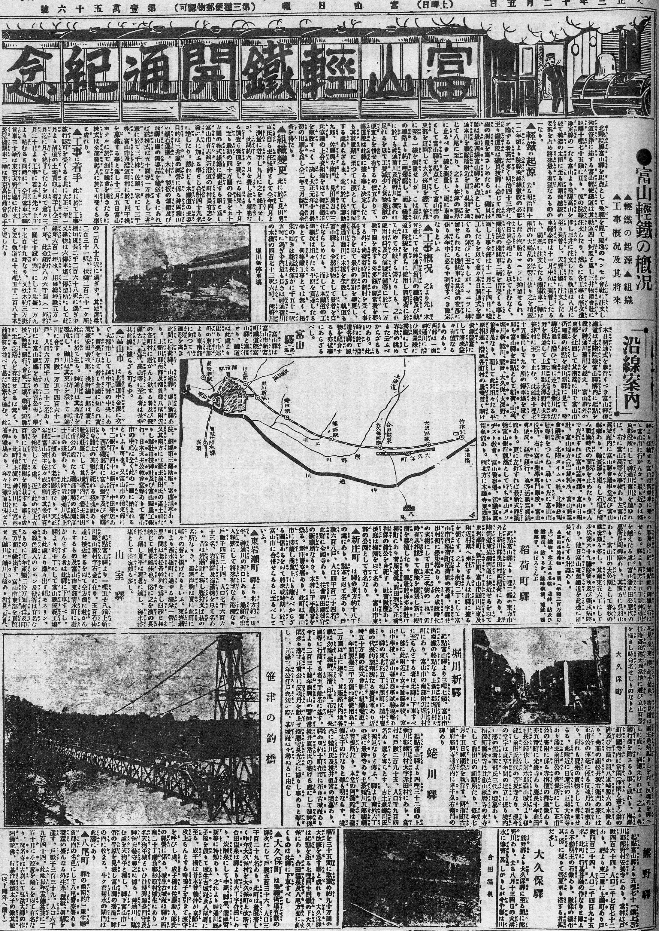 富山 - 笹津間を結ぶ富山軽便鉄道線が開業した旨を報ずる新聞記事